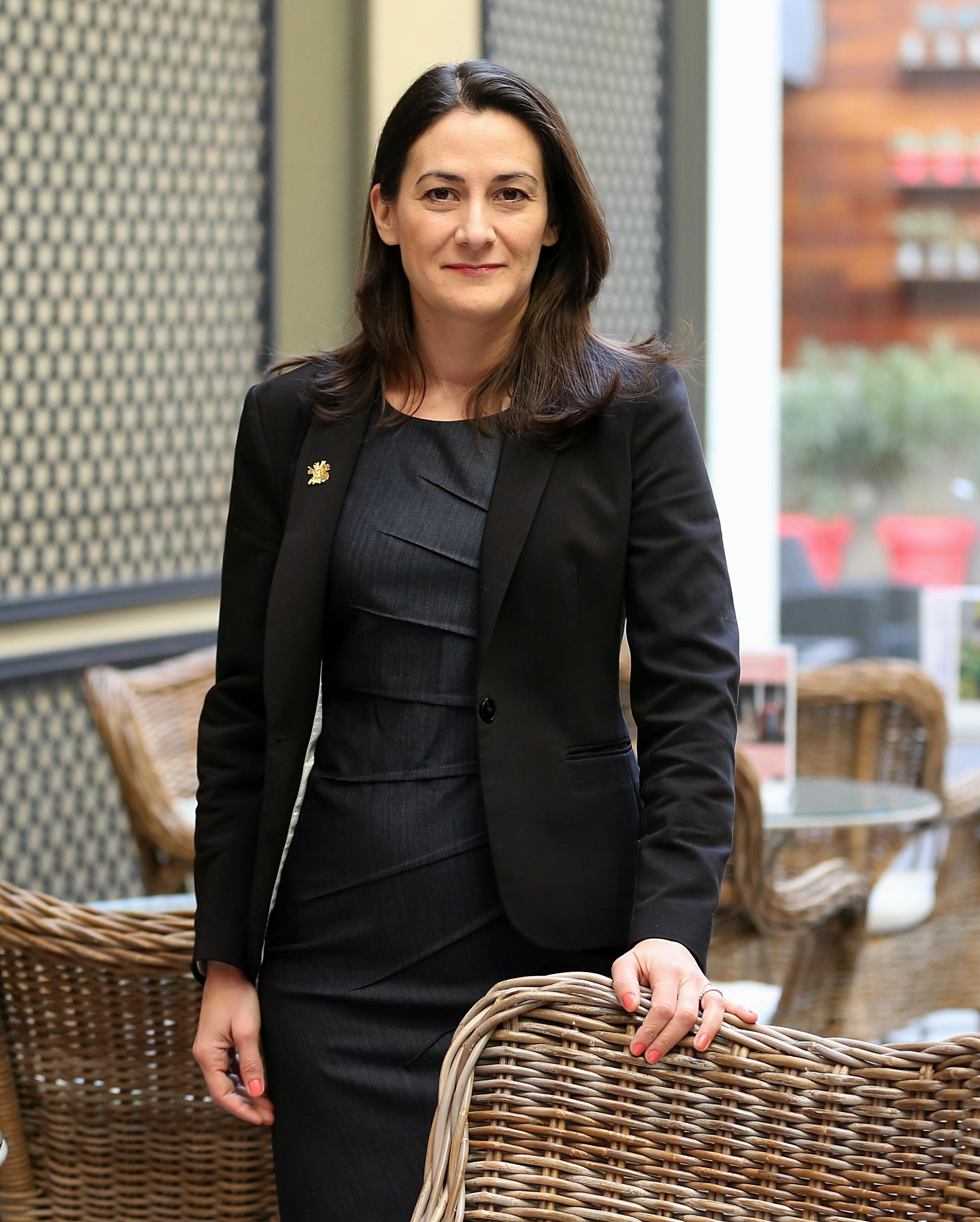 La economista Pavlina Tcherneva es una de las principales exponentes de la corriente de la "Teoría Monetaria Moderna". "El pleno empleo no es la razón de ser del sector privado, que opera sobre la base de lo que es rentable, lo que se puede vender". Cuando el sector privado ya no necesita a sus empleados, es responsabilidad del sector público absorberlos